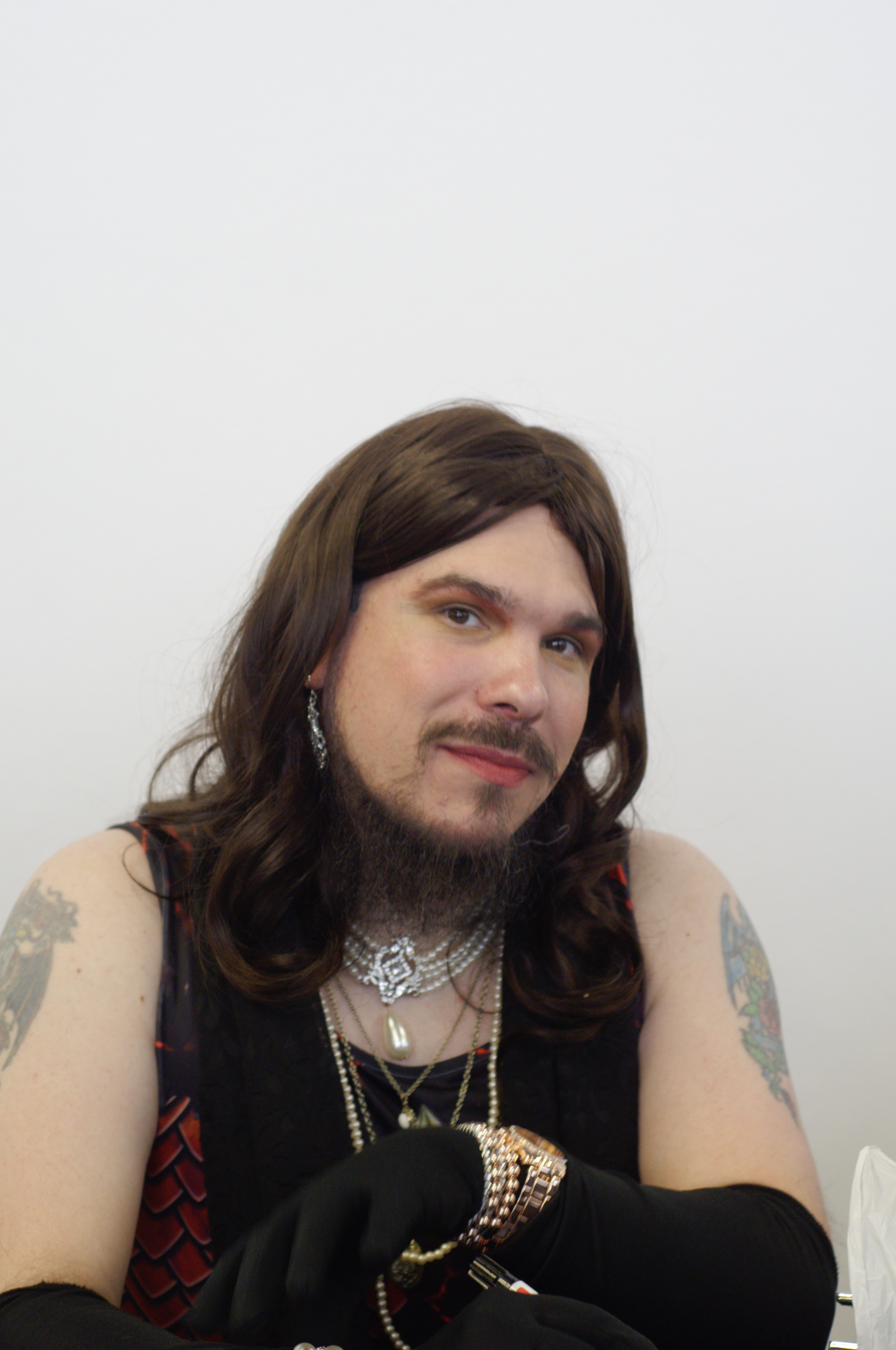 Charlotte Uhlig Shinji Schneider 2020